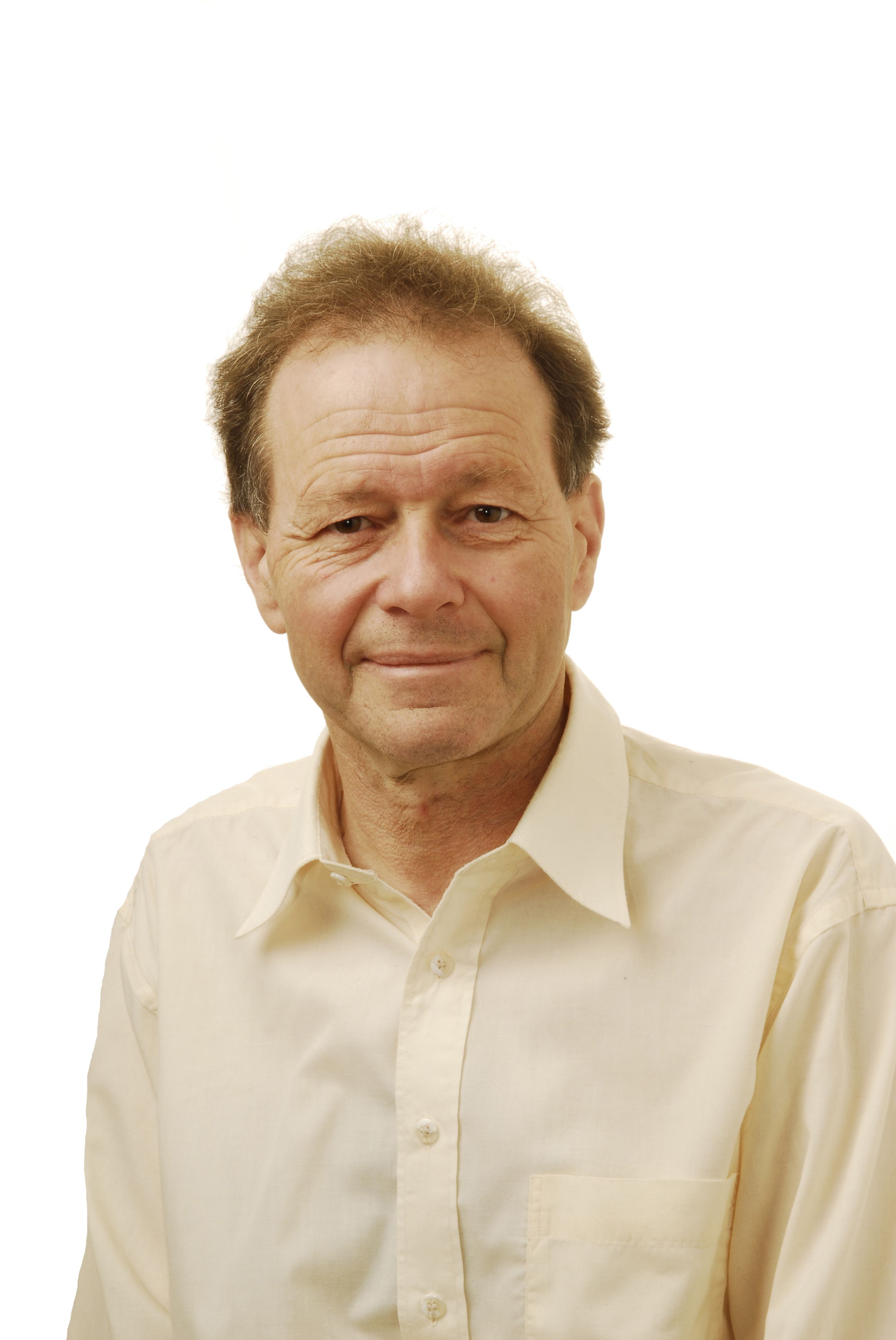 Heiner Studer, Nationalrat, Switzerland Heiner Studer